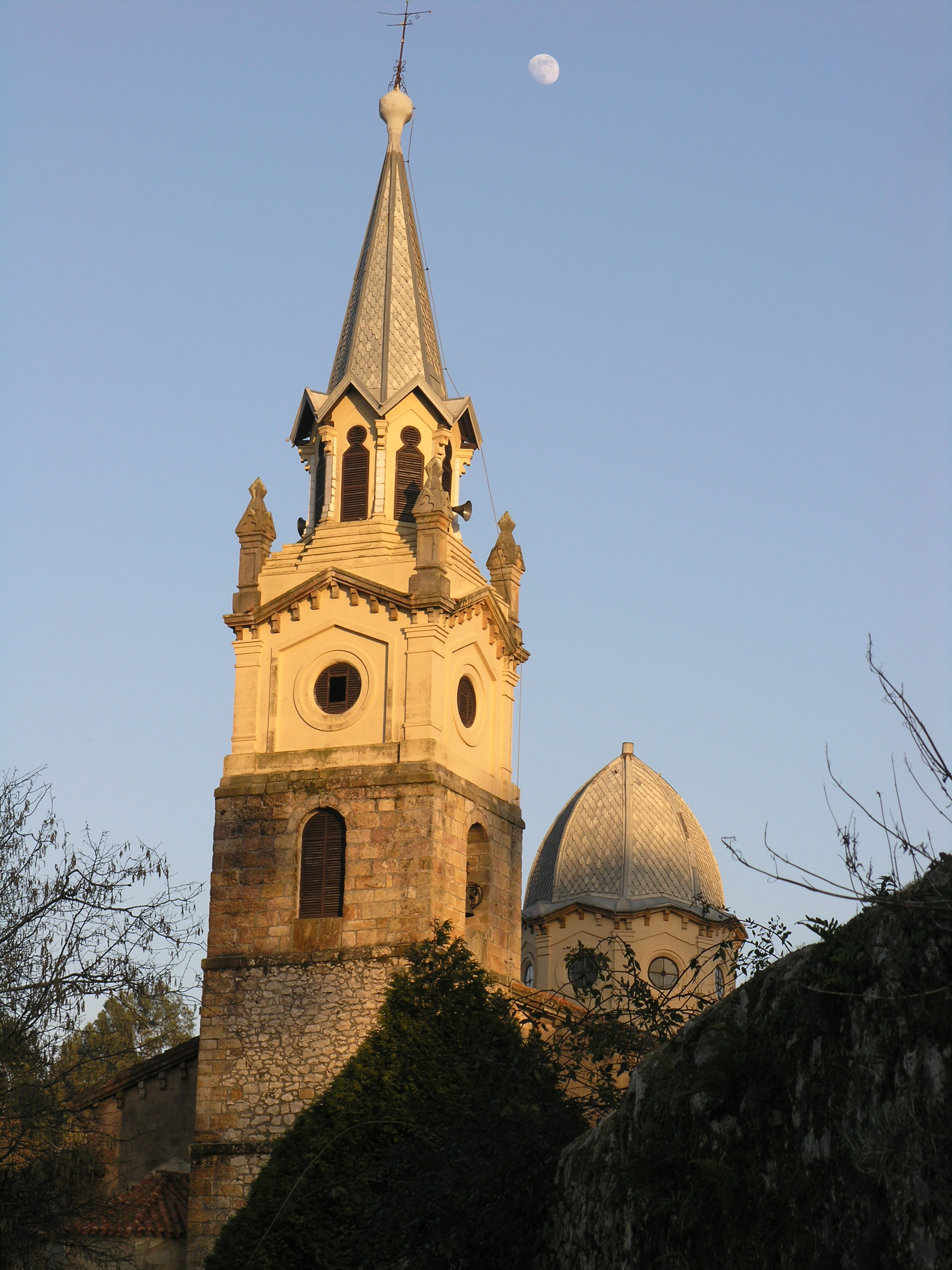 Torre de la Iglesia parroquial de Nuestra Señora de la Asunción de La Iglesia, en Ruiloba, Cantabria, España.